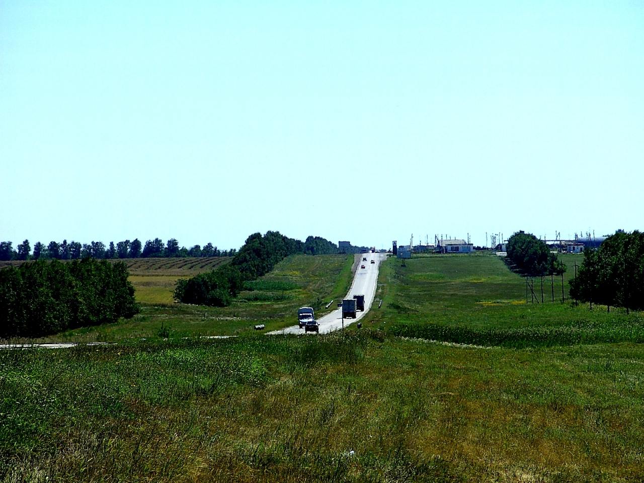 In der Oblast Wolgograd in Russland in der sommerlichen Hitze. Bei der Straße handelt es sich um die russische Fernstraße M6 südöstlich von Nowoanninski.